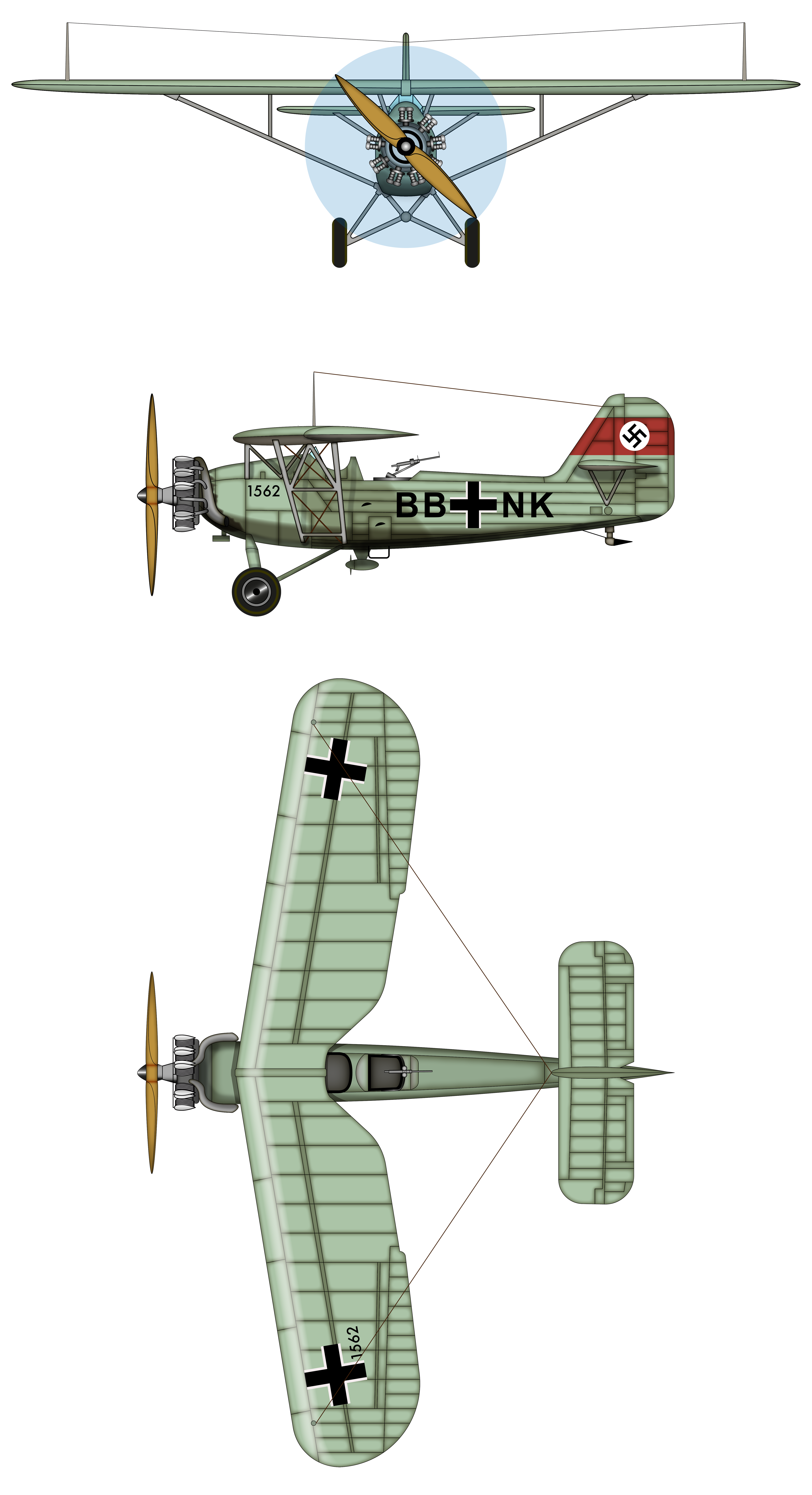 Heinkel He 46: monomotore da ricognizione ad ala alta a parasole sviluppato dall'azienda tedesca Ernst Heinkel Flugzeugwerke AG nei primi anni trenta.